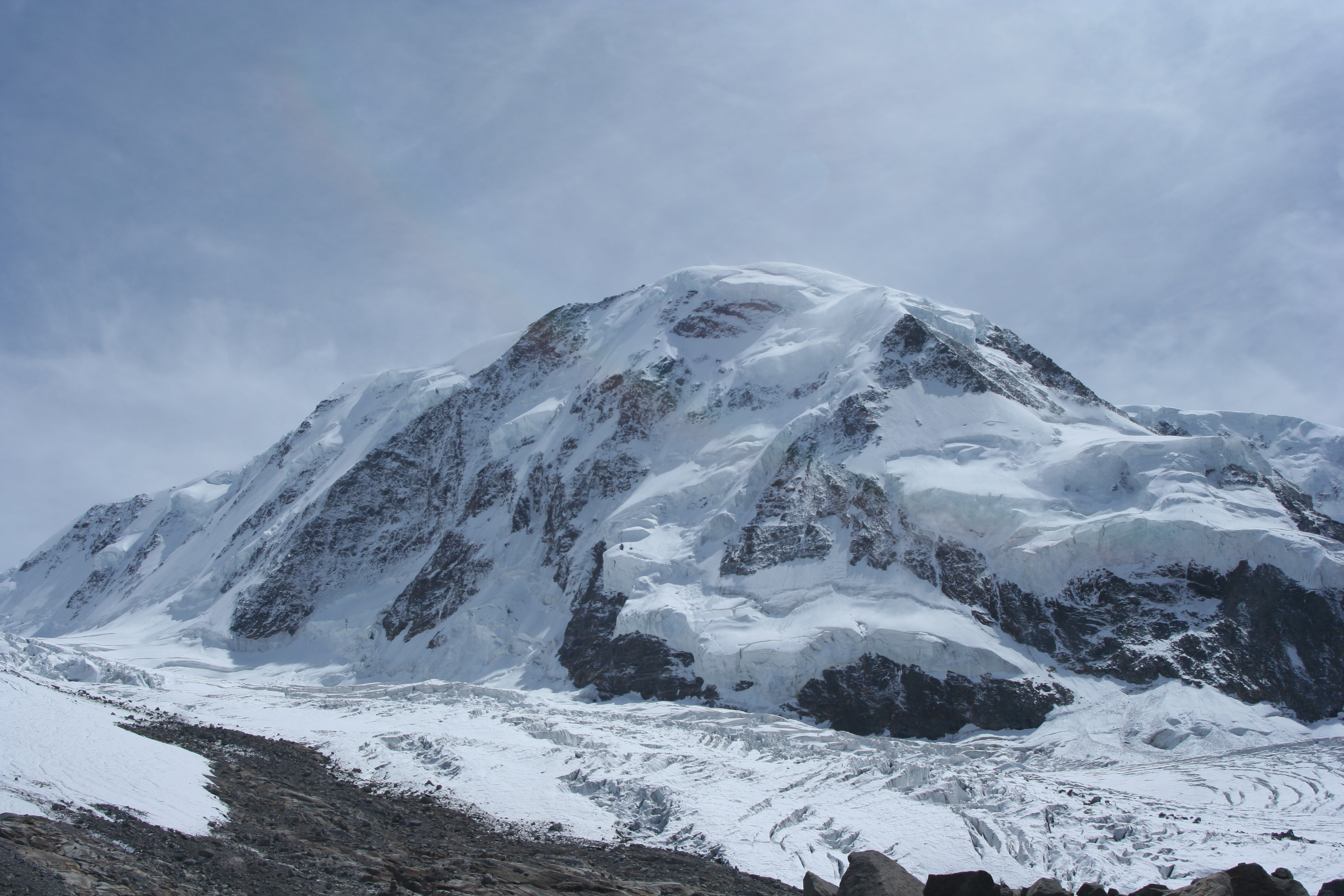 Liskamm (4527 m) in Monte Rosa massif.